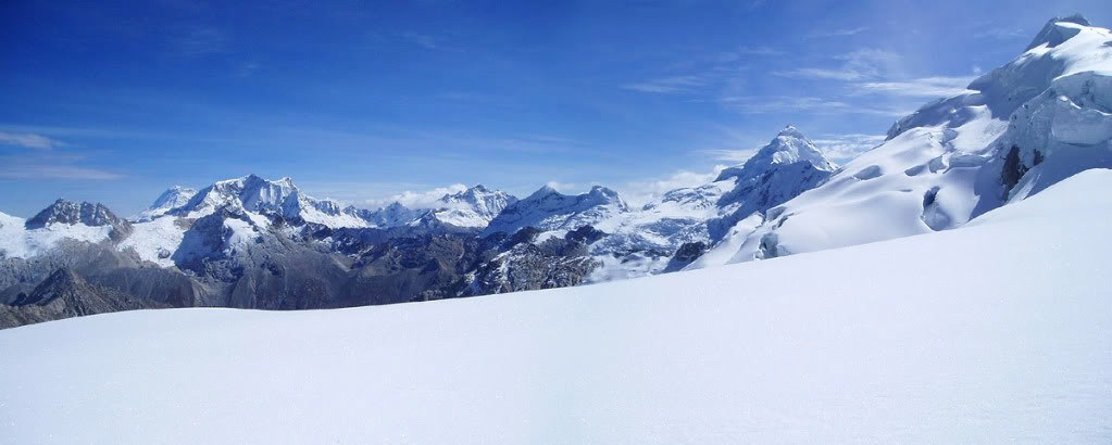 Tocllaraju